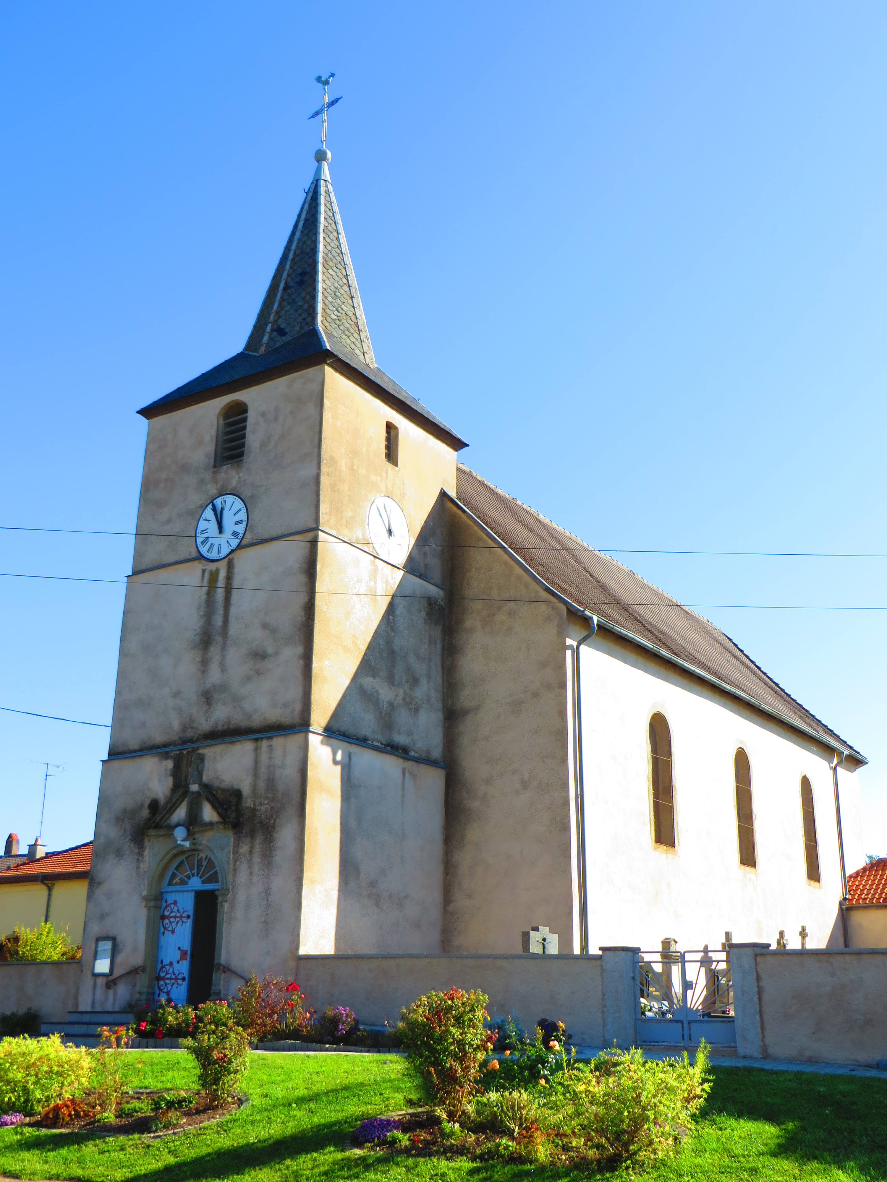 Diane Capelle Église Saint-Denis